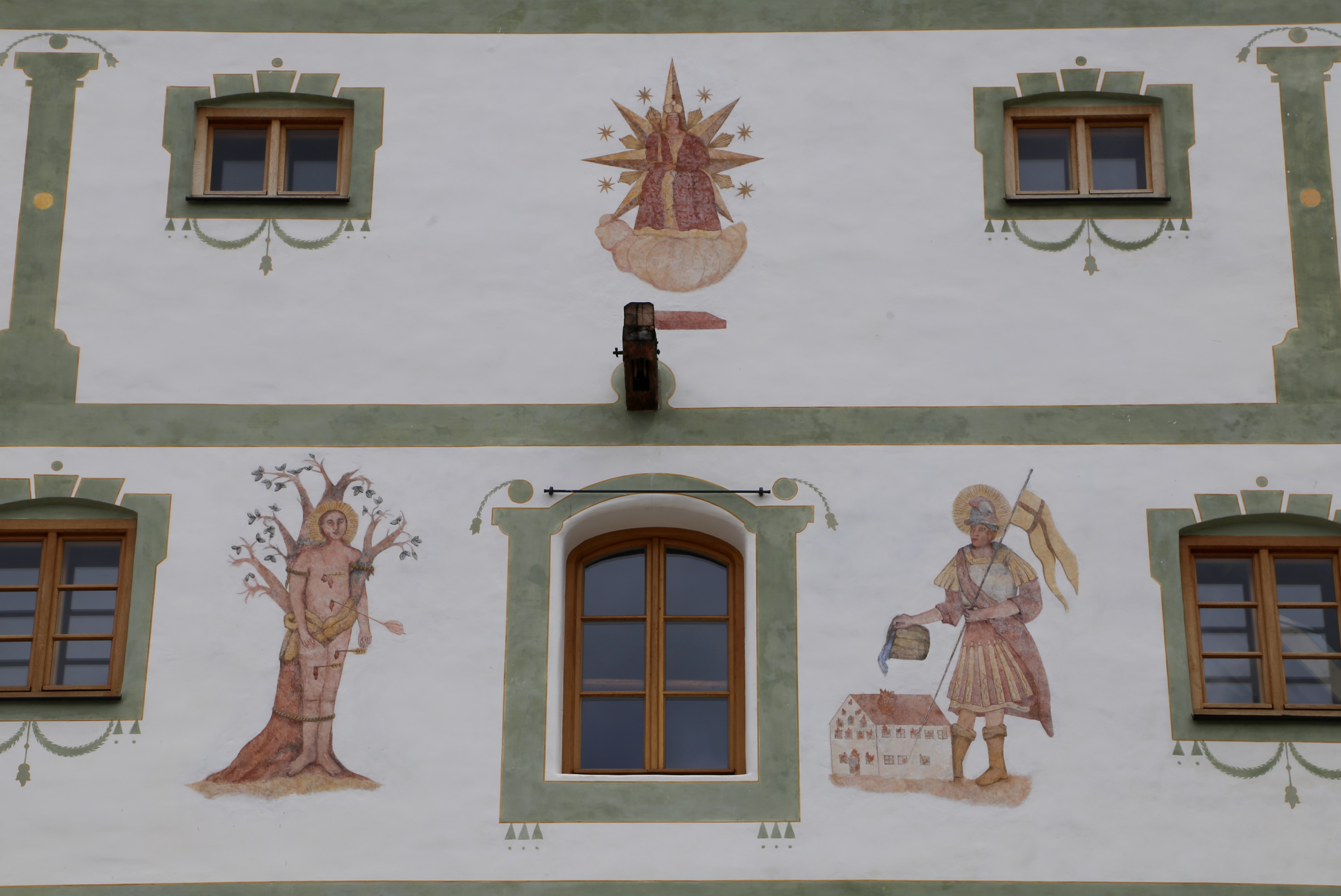 Hauptstraße 14, Erdweg; Gasthof, stattlicher Satteldachbau mit Schwalbenschwanzzinnen, im Kern 16. Jahrhundert, später verändert.